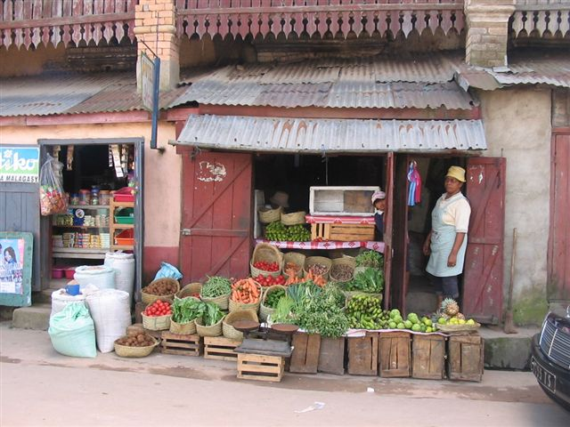 Epicerie_d'Anjozorobe